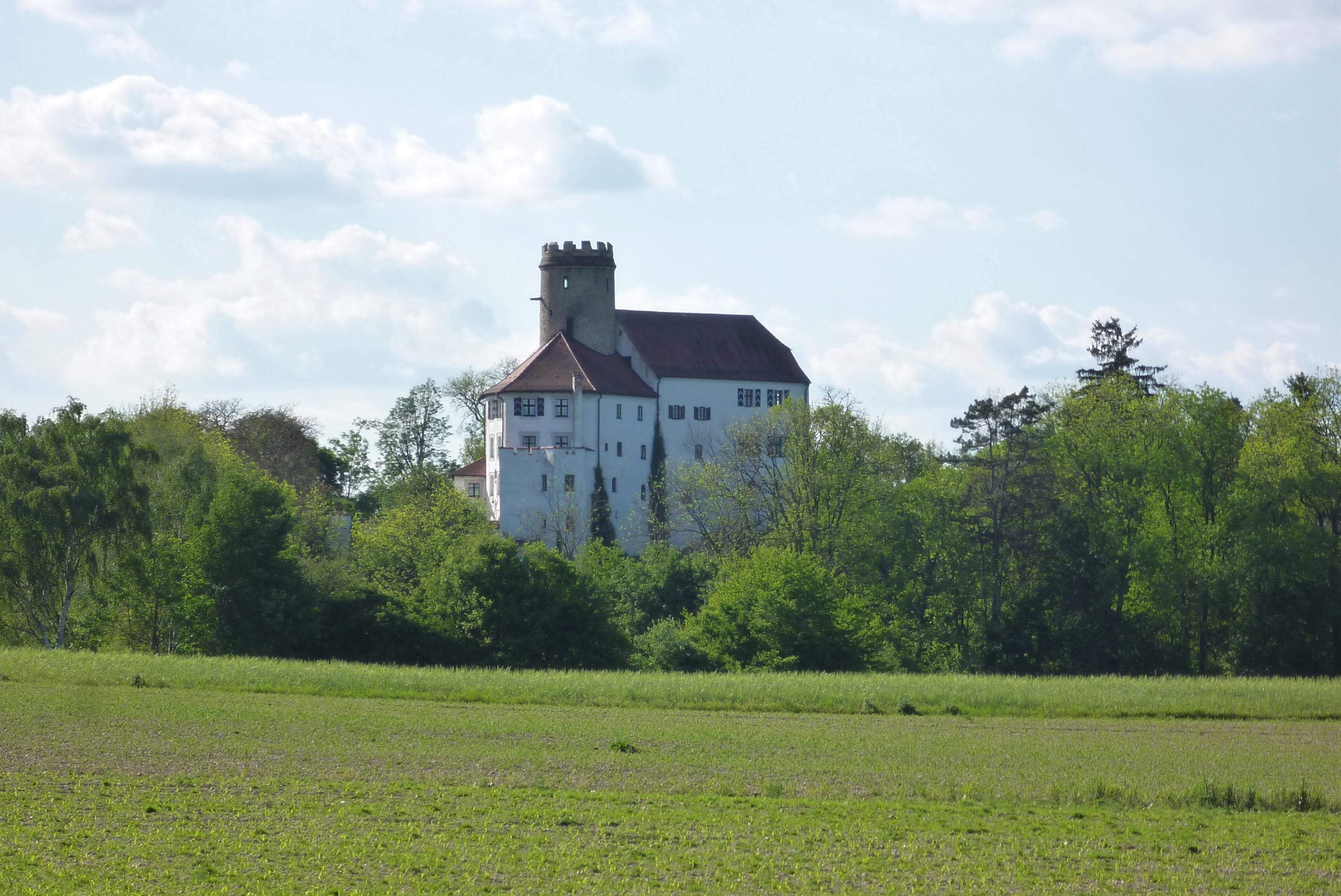 Die Schlossburg Thierlstein wurde auf massivem Pfahlquarzhärtling errichtet. Der helle Pfahlquarz wurde in die Fundamente des Gebäudes mit eingebaut. Leider ist das Schloss in Privatbesitz, sodass das Geotop nicht öffentlich zugänglich ist. Nummer: 372R005.